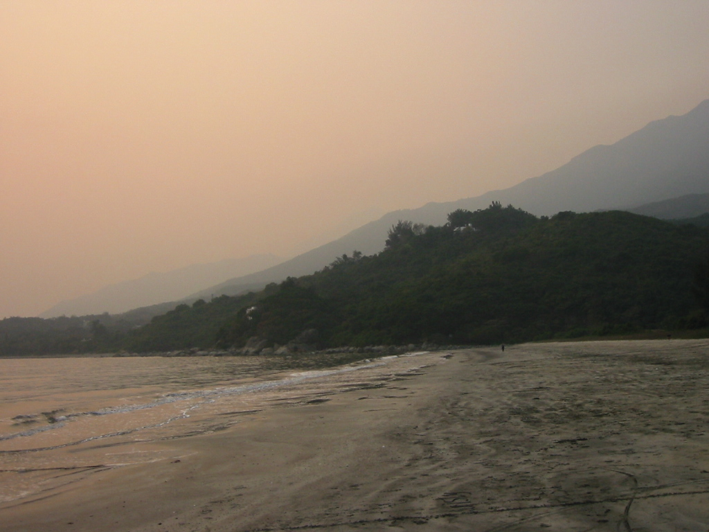 Pui O Beach 貝澳泳灘